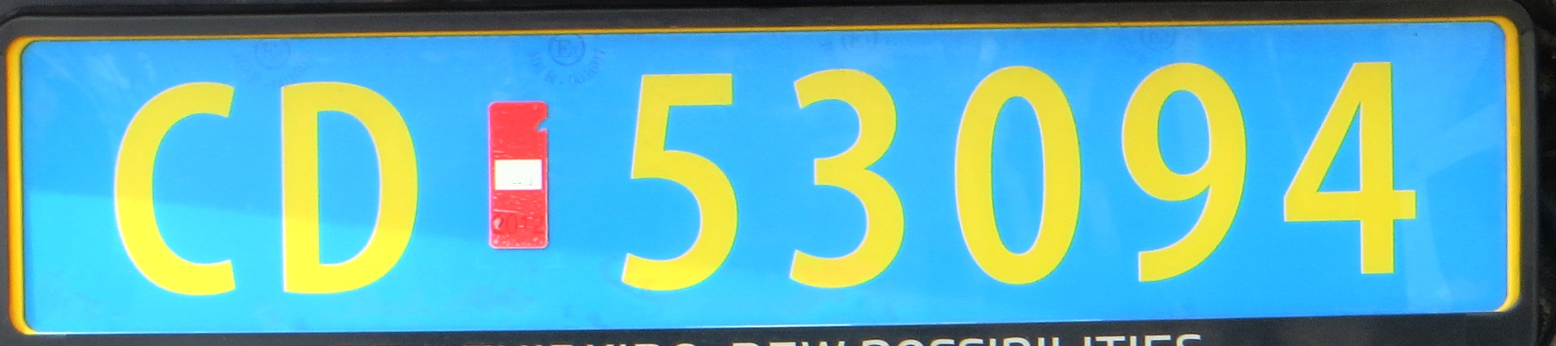 Noorse CD kenteken plaat